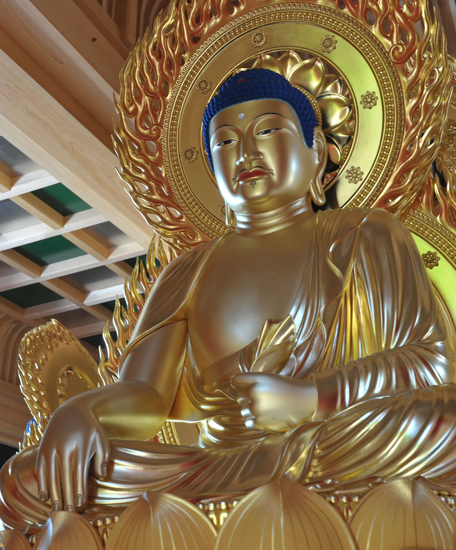 2018年5月12日に落成した蓮華院多宝塔に祀られる阿シュク如来（五智如来の一体）。毎年1月13日・4月29日・6月13日にご開帳。